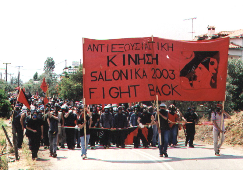 Το μπλοκ της Αντιεξουσιαστικής Κίνησης, Θεσσαλονίκη, 2003